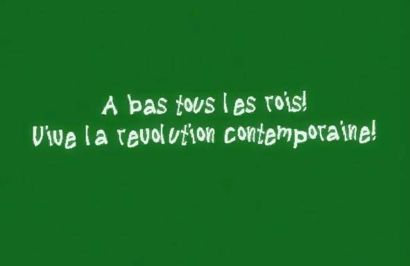 A bas tous les rois! Vive la revolution contemporaine!" ("Доле сви краљеви! Живела савремена револуција!"). Натпис на школској табли који је проузроковао инцидент у Бијељинској гимназији 1934. године. Репродукција.